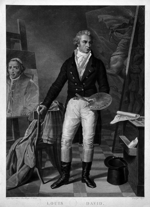 Jacques Louis Davids dans son atelier (aquatint etching, 72,4 x 53,9 cm)